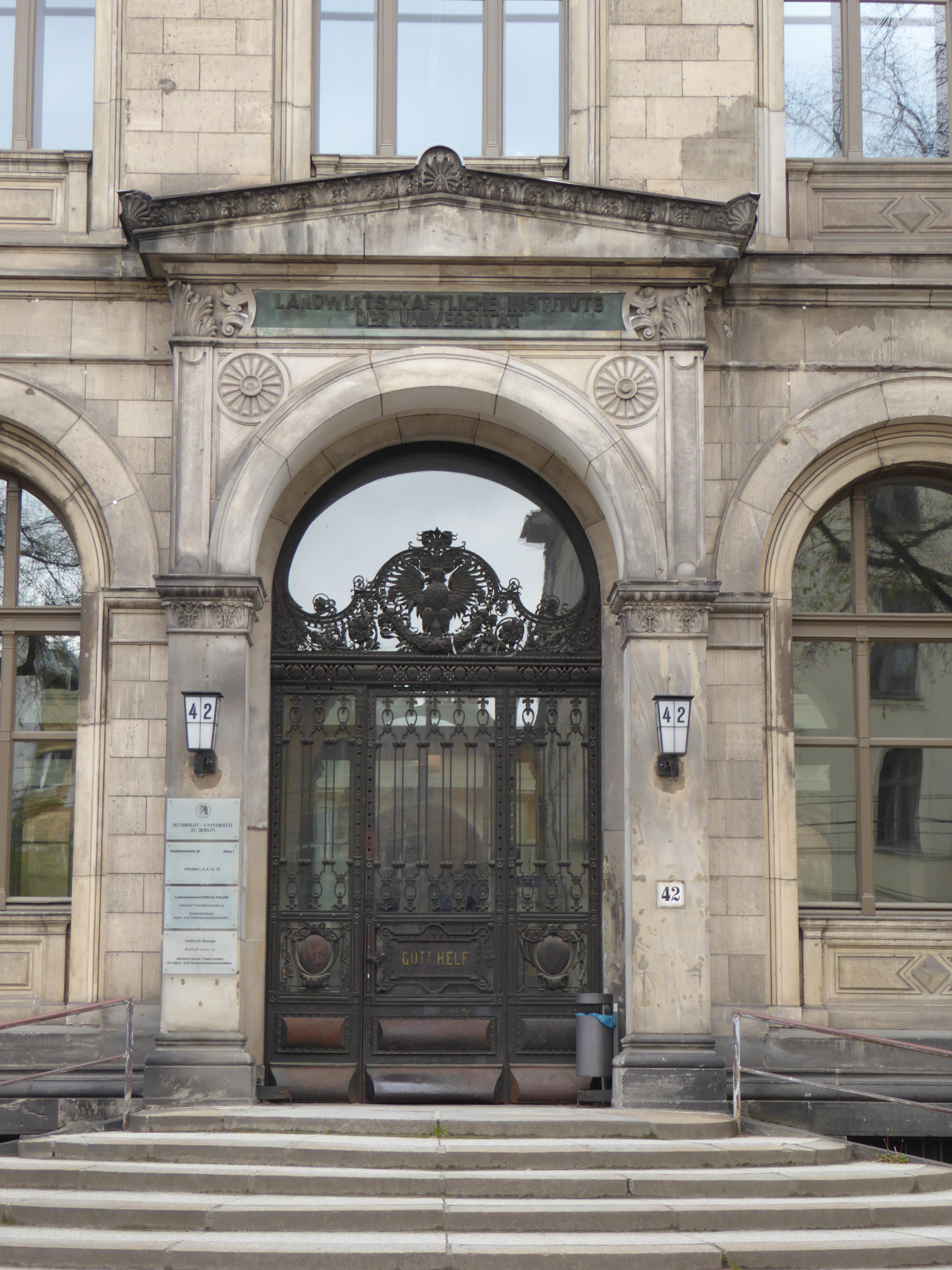 Eingangsportal des "Landwirtschaftliches Institut der Humboldt - Universität zu Berlin", Invalidenstraße 42 Haus 1, Hörsäle 1, 2, 4, 13, 19, Lebenswissenschaftliche Fakultät (Agrar- und Gartenbauwissenschaften), Institut für Biologie (Biophysik) (Albrecht Daniel Thaer-Institut für Agrar- und Gartenbauwissenschaften)